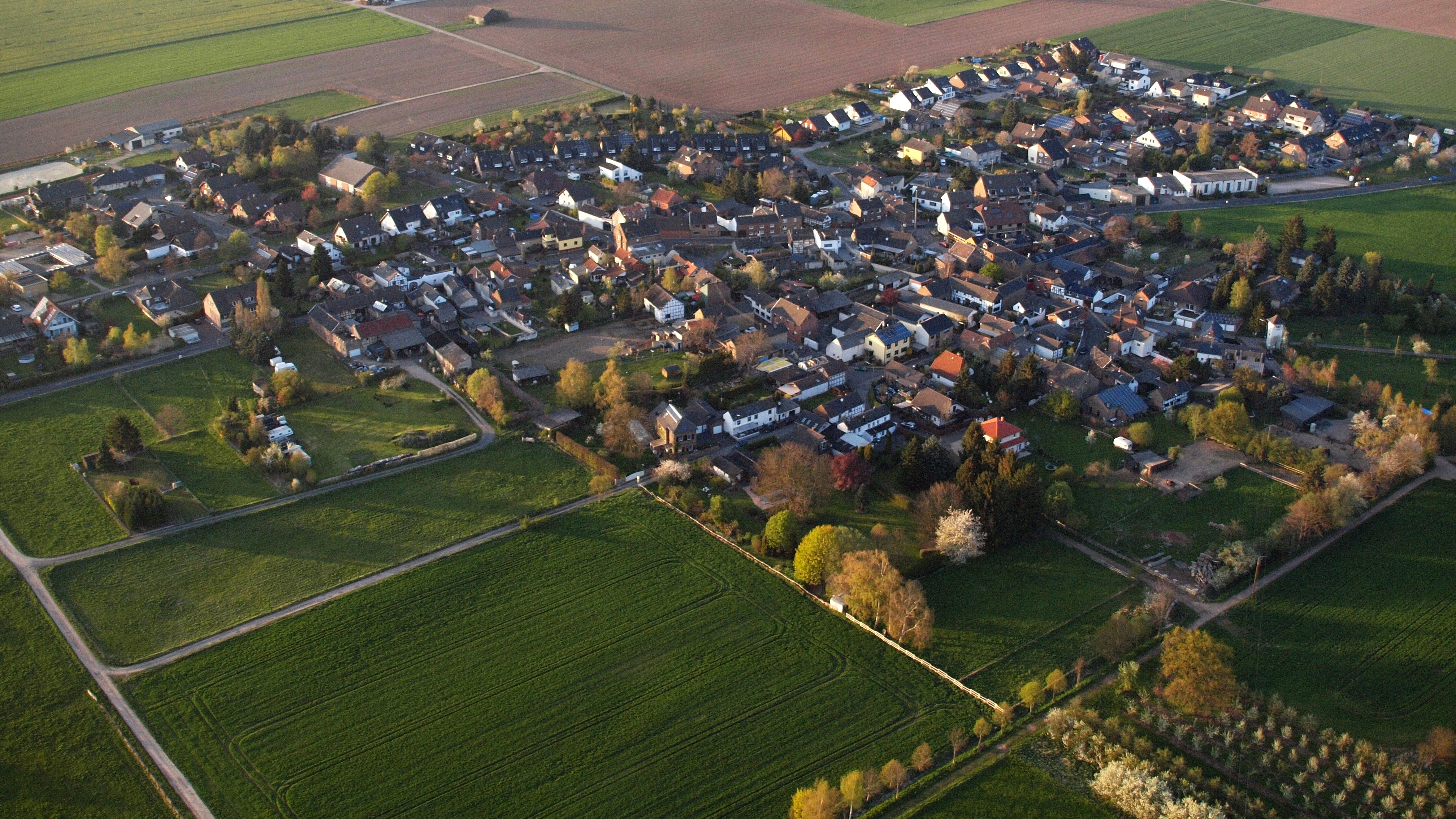 Niederelvenich, Luftaufnahme (2015)